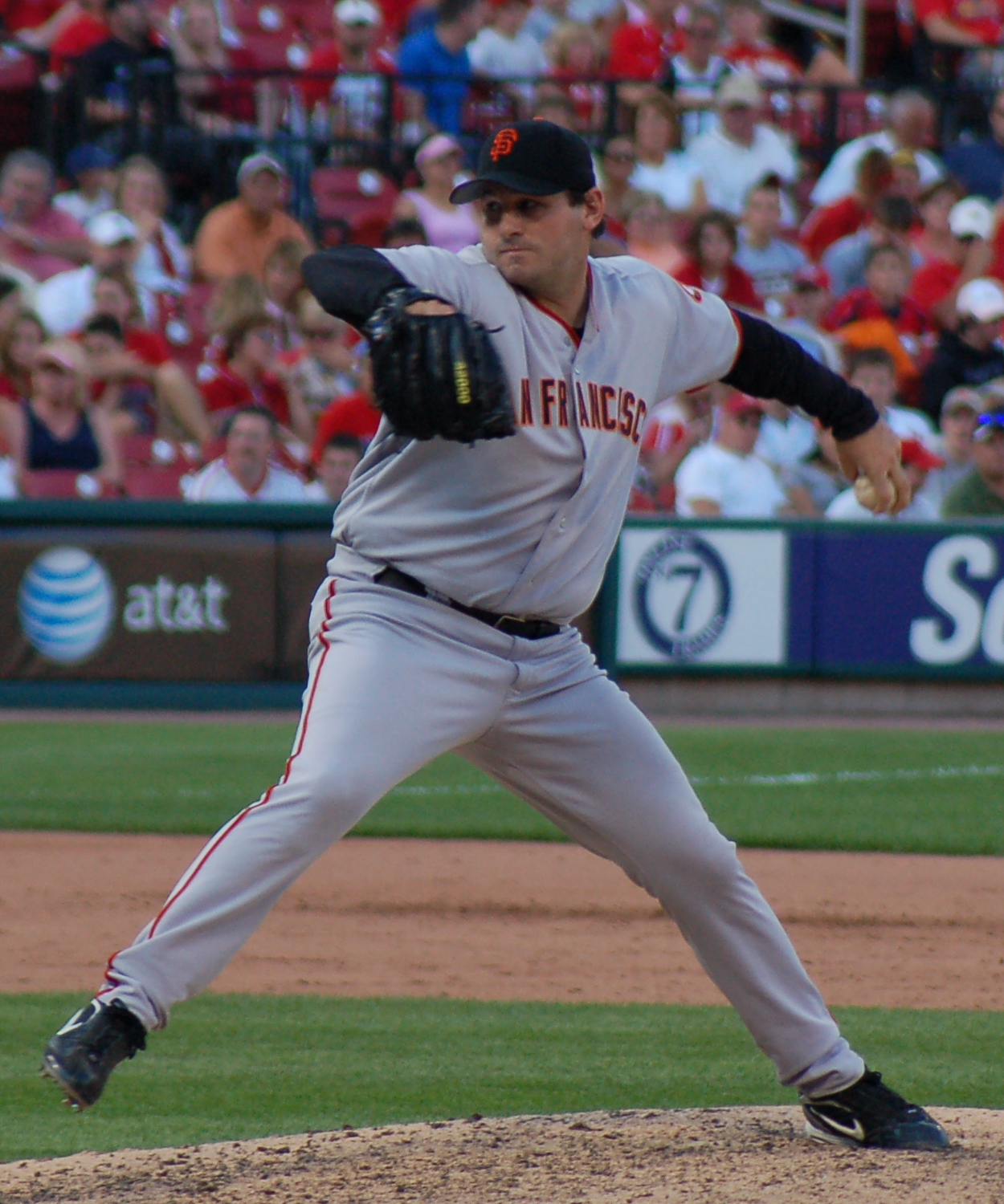 Steve Kline